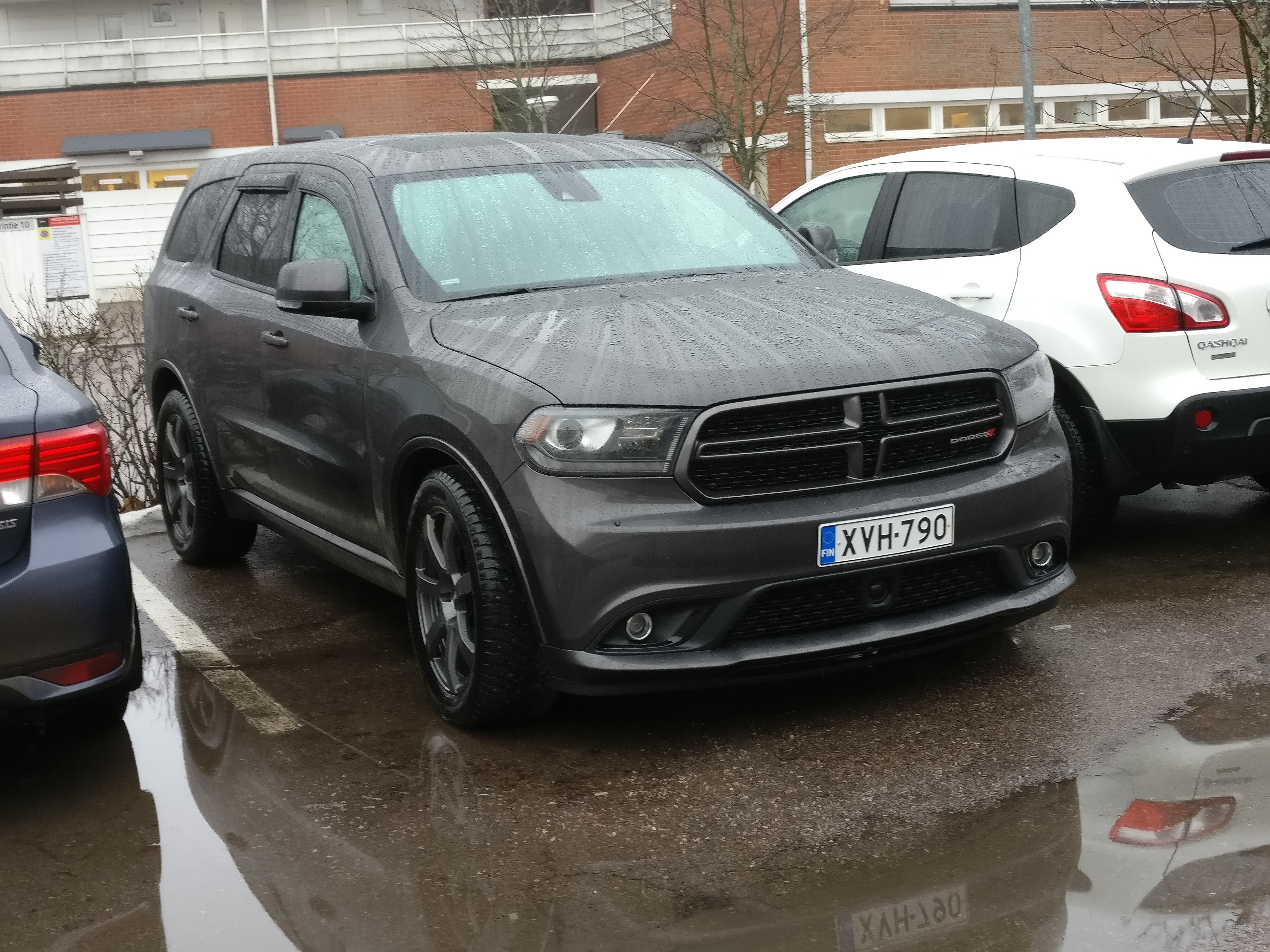 Third generation Dodge Durango in Helsinki, Finland